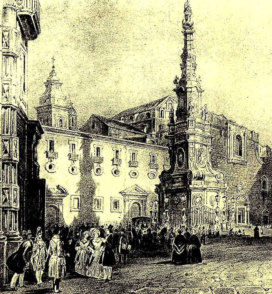 Zenon - Napoli, Piazza del Gesù Nuovo con cuglia dell'Immacolata.